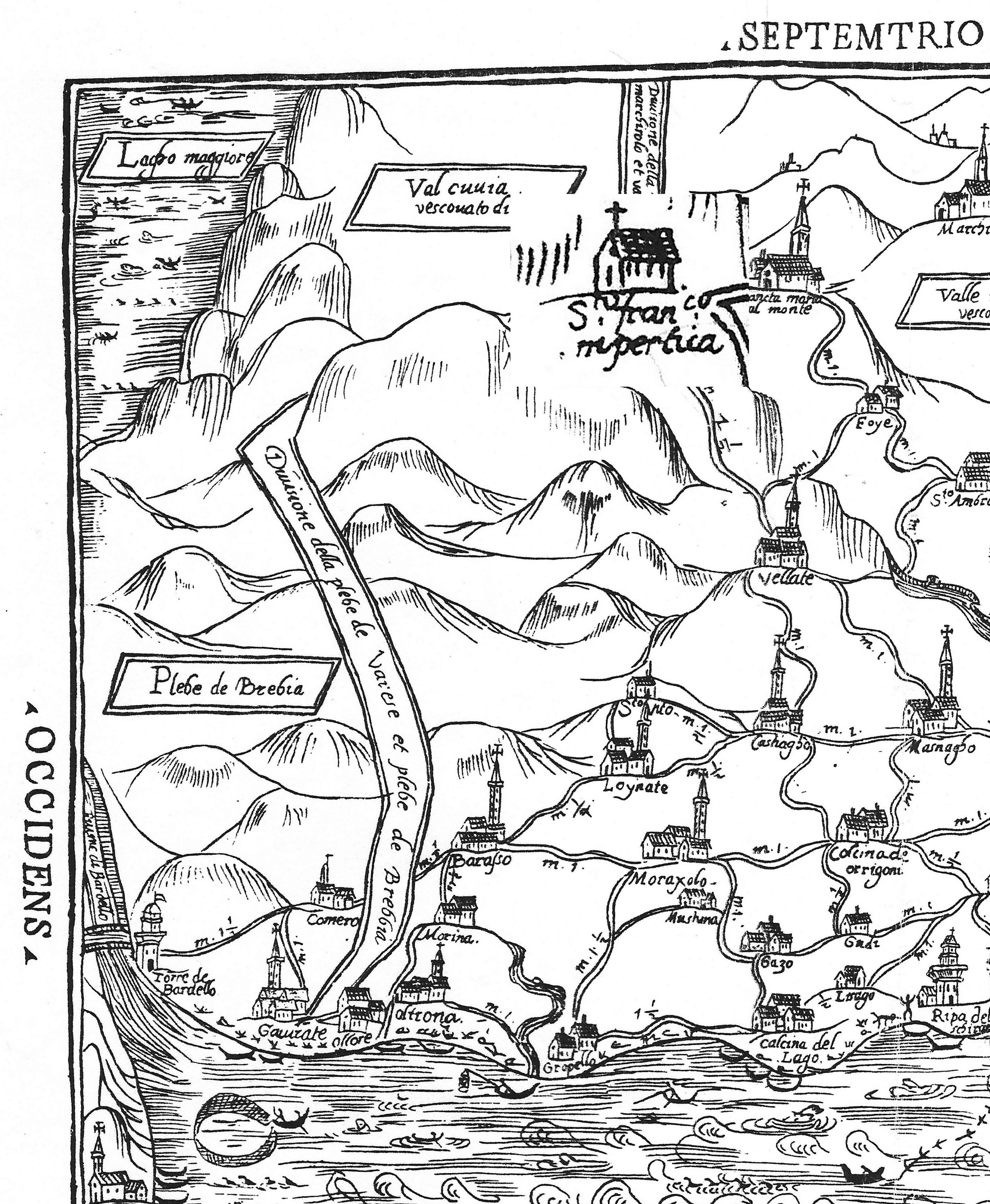 Mappa di Varese del 1581 con ingrandimento della località S.Francesco in Pertica